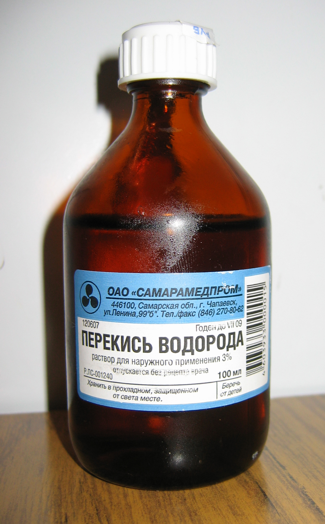 Hydrogen peroxide